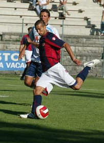 Davide Di Gennaro in azione al Bologna.